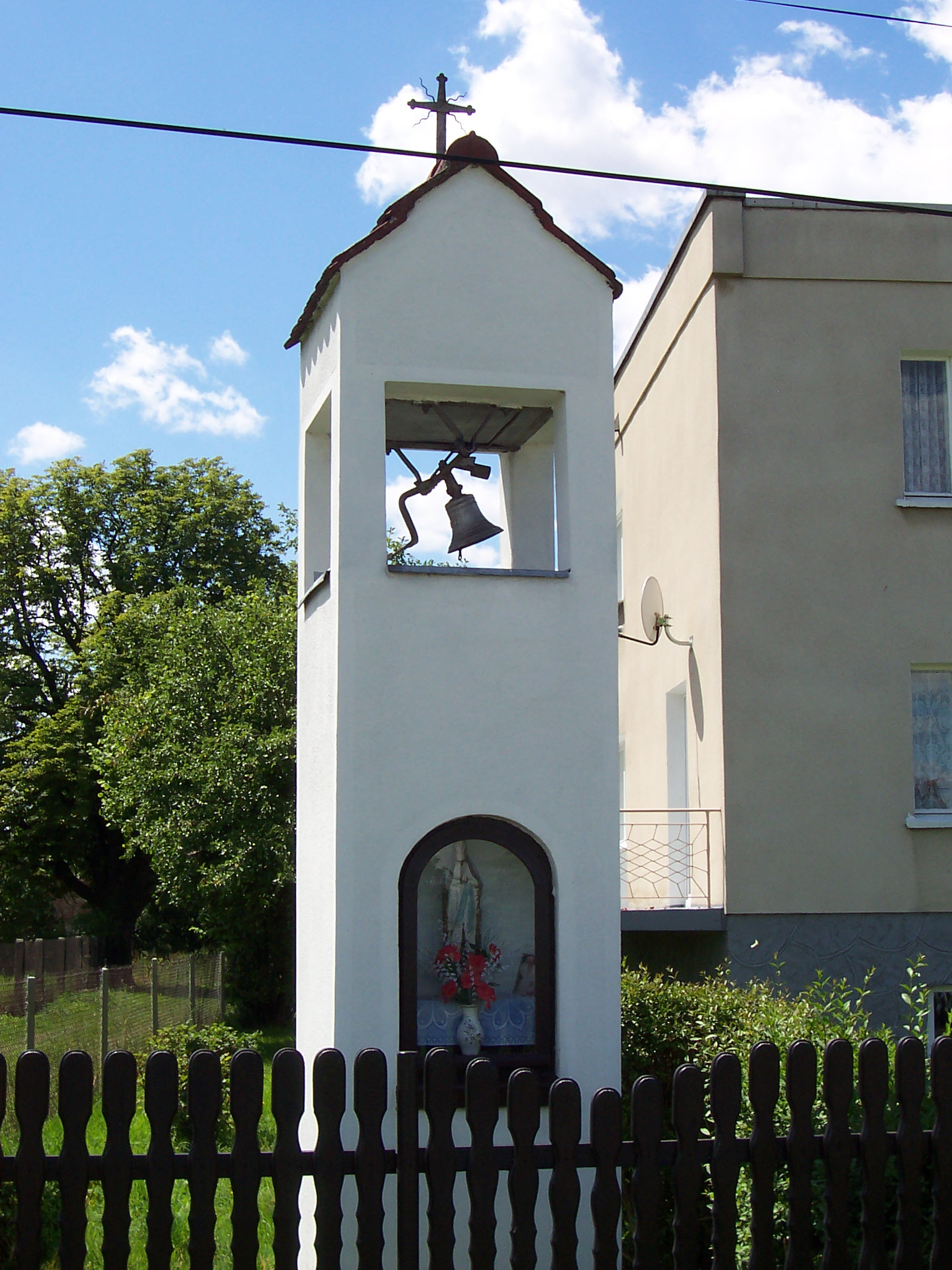 Kapliczka przydrożna w Połomii (powiat tarnogórski)